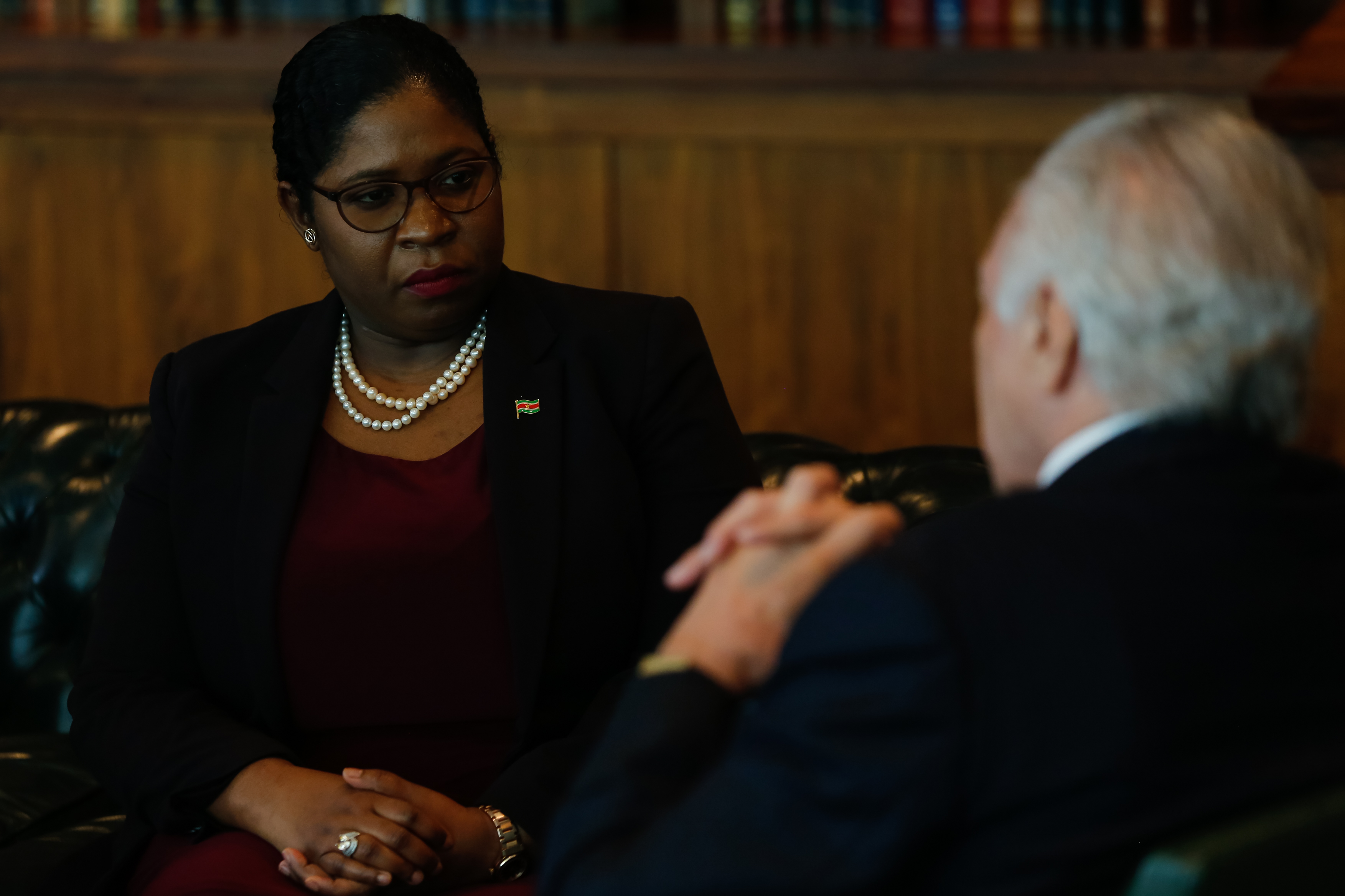 Yldiz Pollack-Beighle e Michel Temer em fevereiro de 2018.